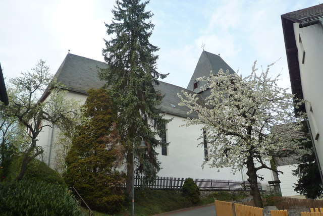 Evangelische Kirche in Erda